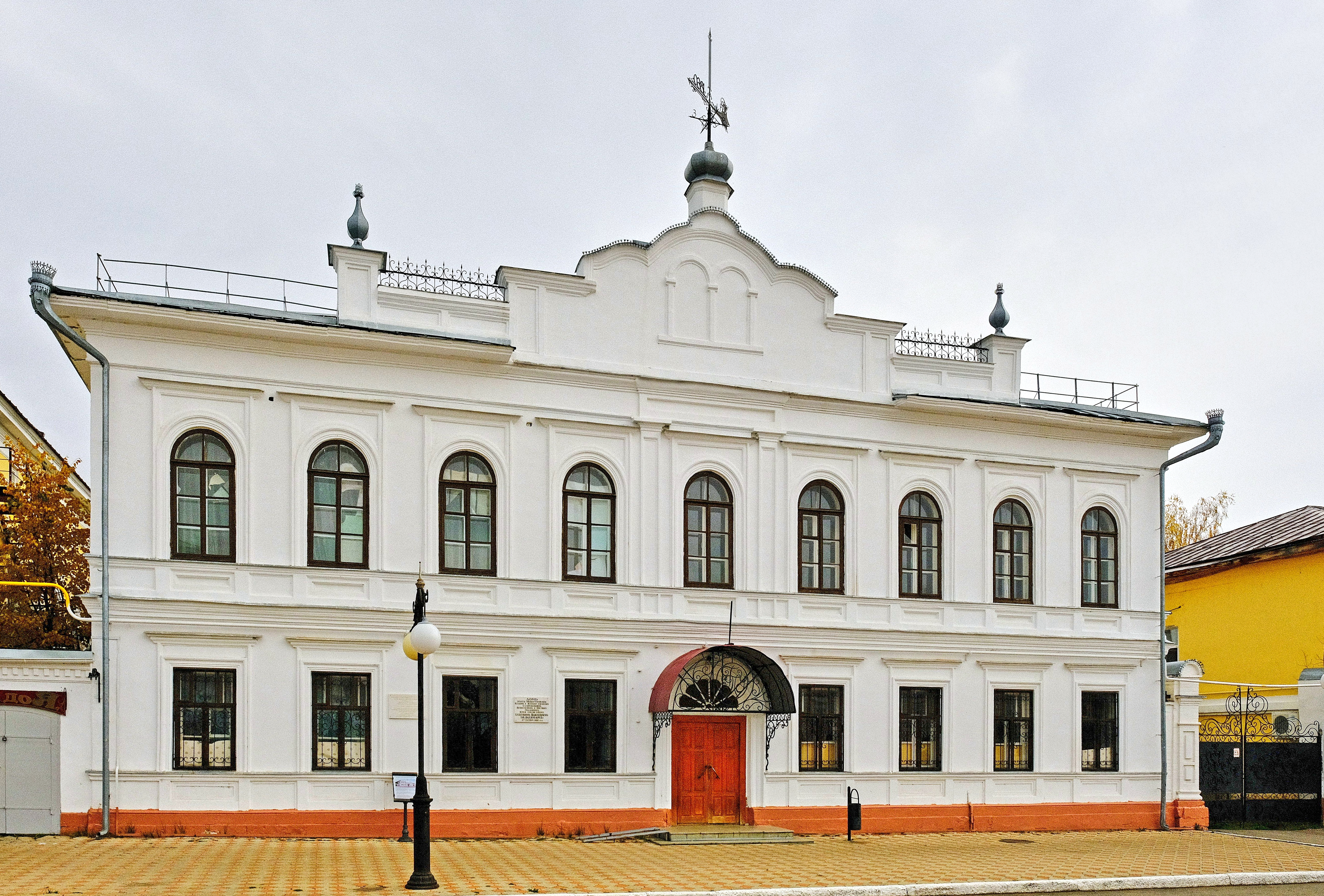 Главный учебный корпус с церковью: улица Карла Маркса, 23, Елабуга, Татарстан